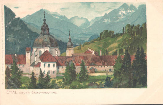 Ansichtskarte nach einem Gemälde von Michael Zeno Diemer